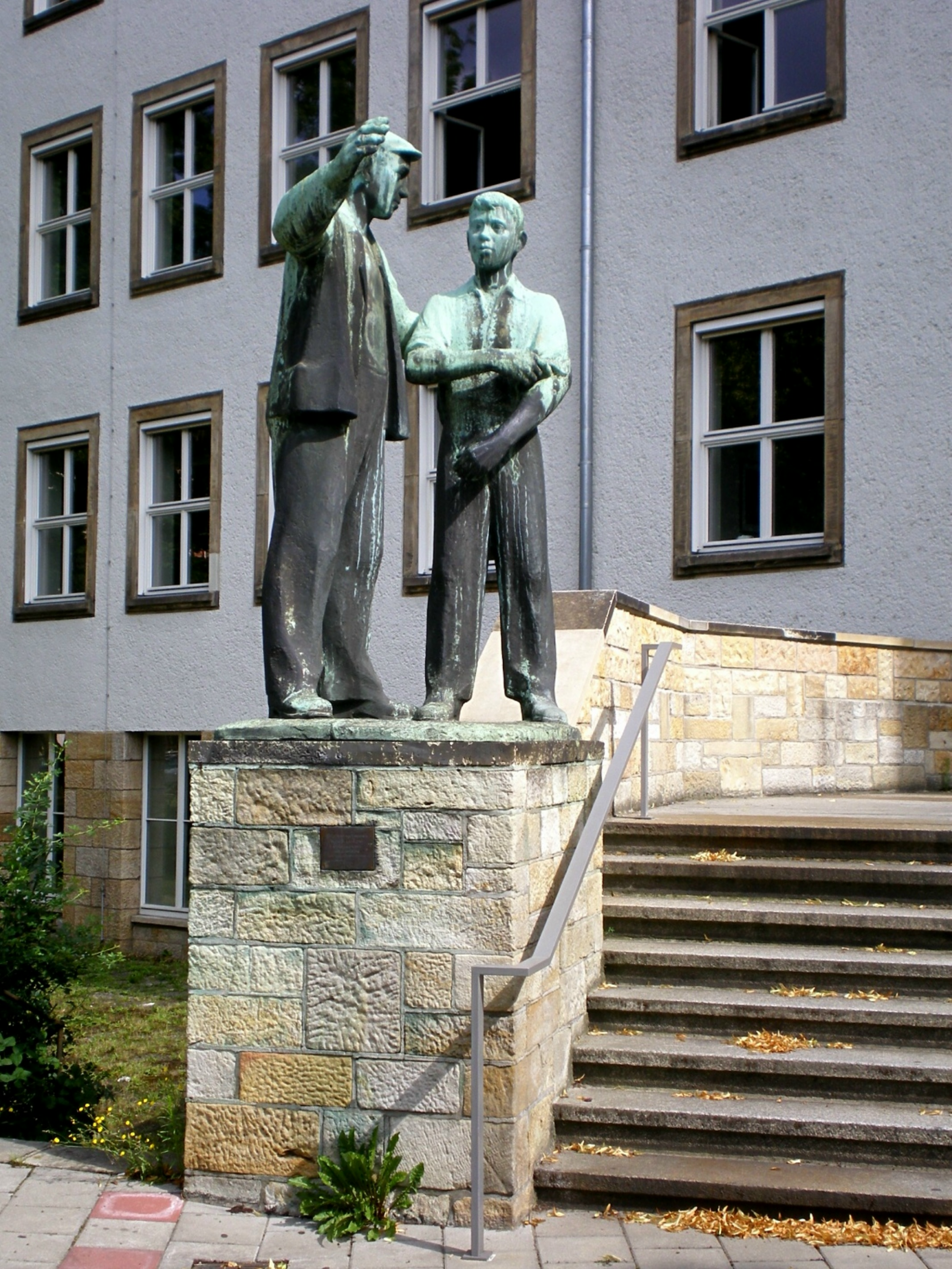 "Arbeiter und Lehrling" vom Dresdner akademischen Bildhauer Wilhelm Landgraf in Dresden Strassburger Platz; geschaffen 1961.